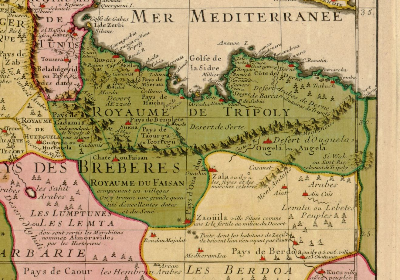 Map of North West Africa (original title: Carte de la Barbarie de la Nigritie et de La Guinee)